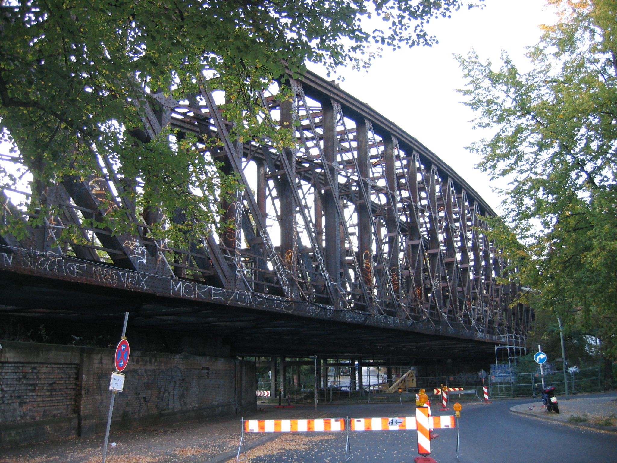 Alte Liesenbrücke, Berlin-Gesundbrunnen